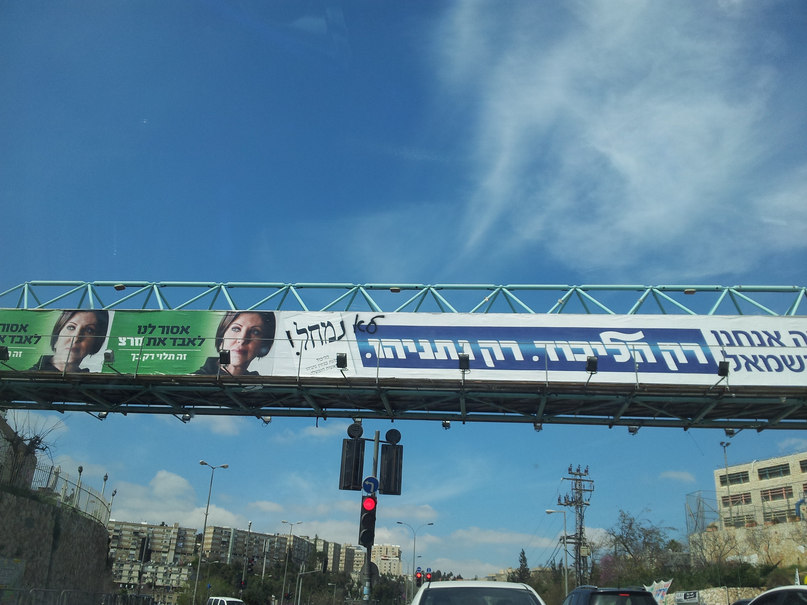 השחתת כרזת בחירות של הליכוד